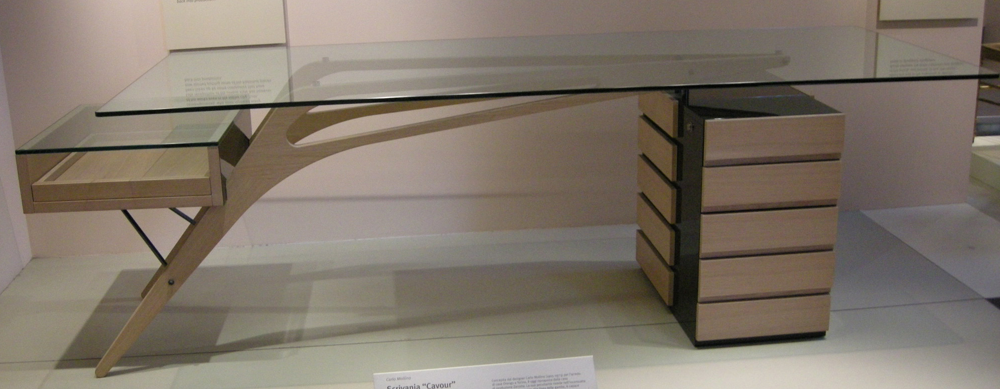 Carlo mollino, scrivania cavour 1949-2003